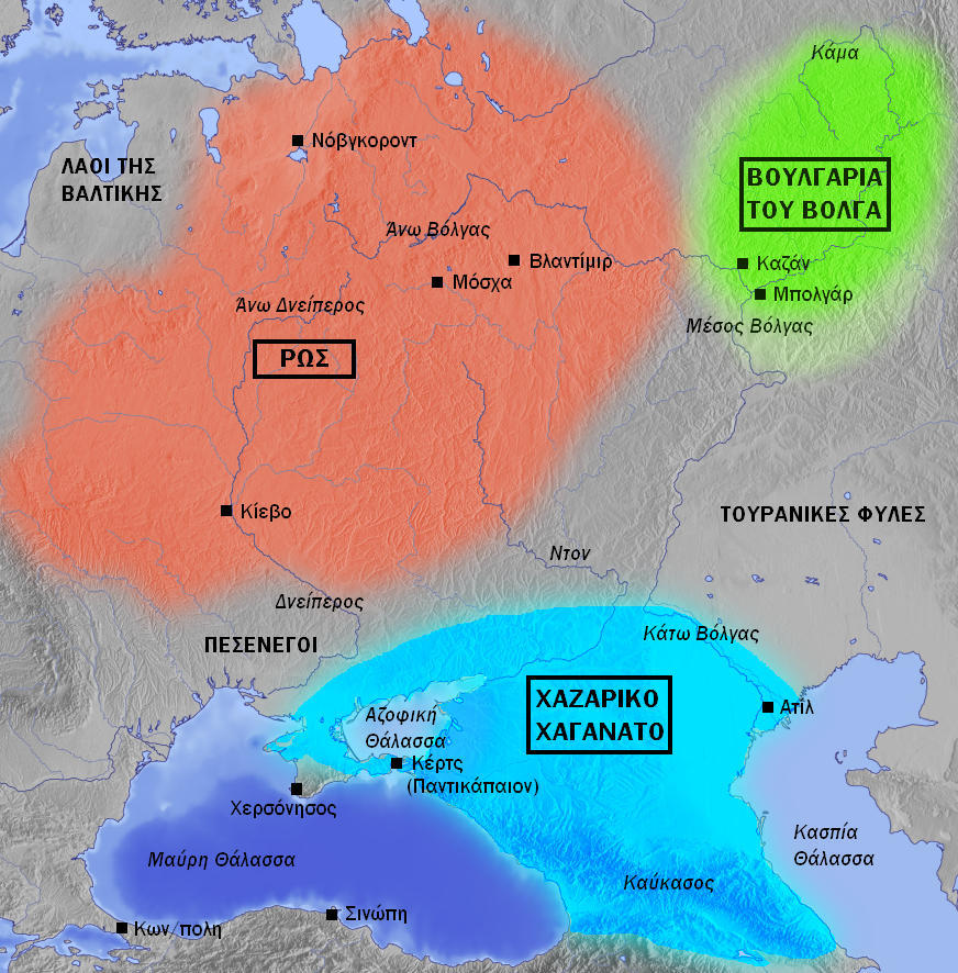 Η ευρύτερη περιοχή του Δνείπερου και του Βόλγα στα μέσα του 10ου αιώνα, πριν την κατάλυση του Χαζαρικού Χαγανάτου από τους Ρως. Η Μόσχα και το Βλαντίμιρ δεν είχαν ιδρυθεί ακόμα, εμφανίζονται όμως στο χάρτη για υποβοήθηση του προσανατολισμού.